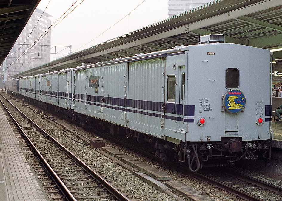 カートレイン名古屋